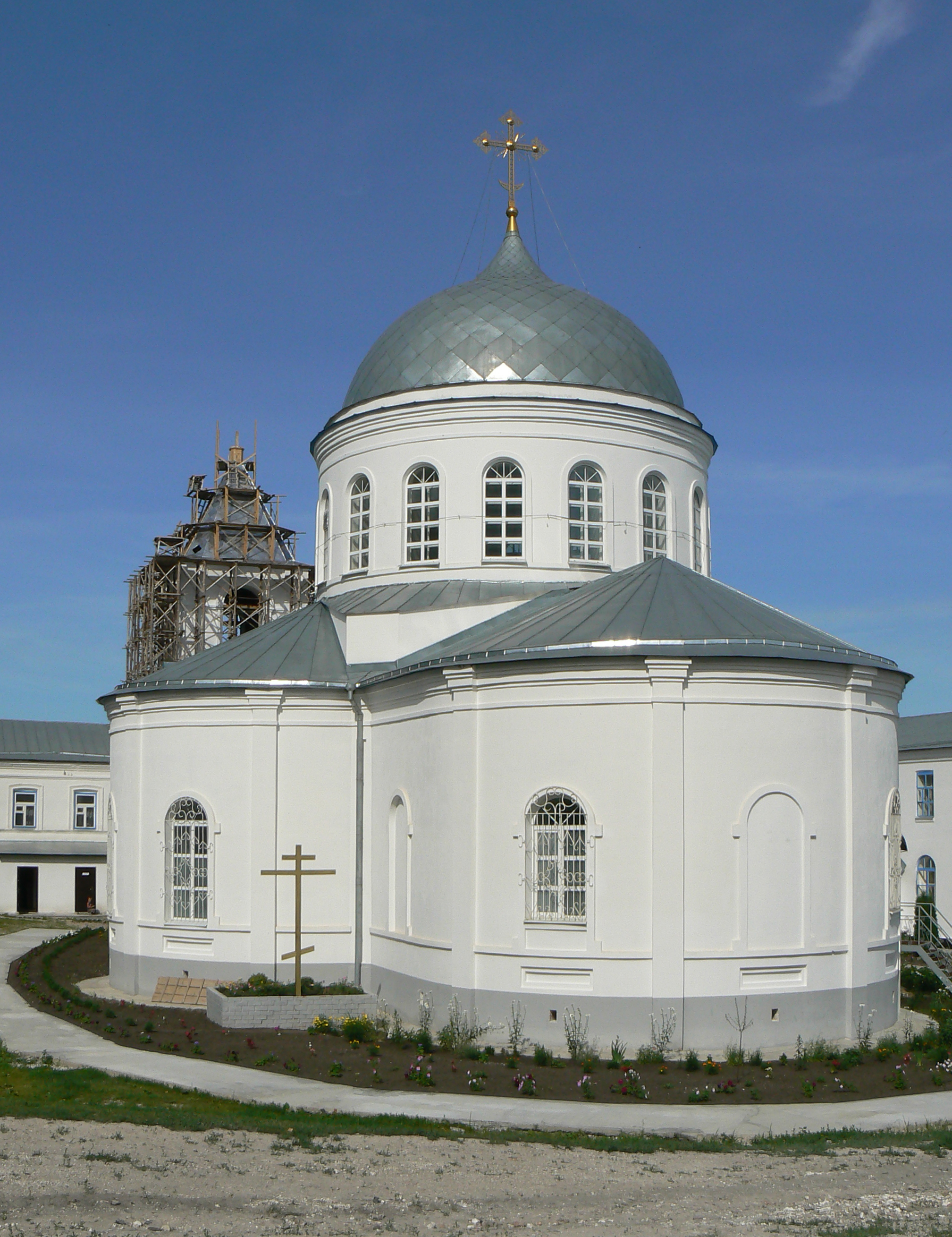 Церковь Успения /главная/: Посёлок Тубсанатория «Дивногорье», Лискинский район, Воронежская область